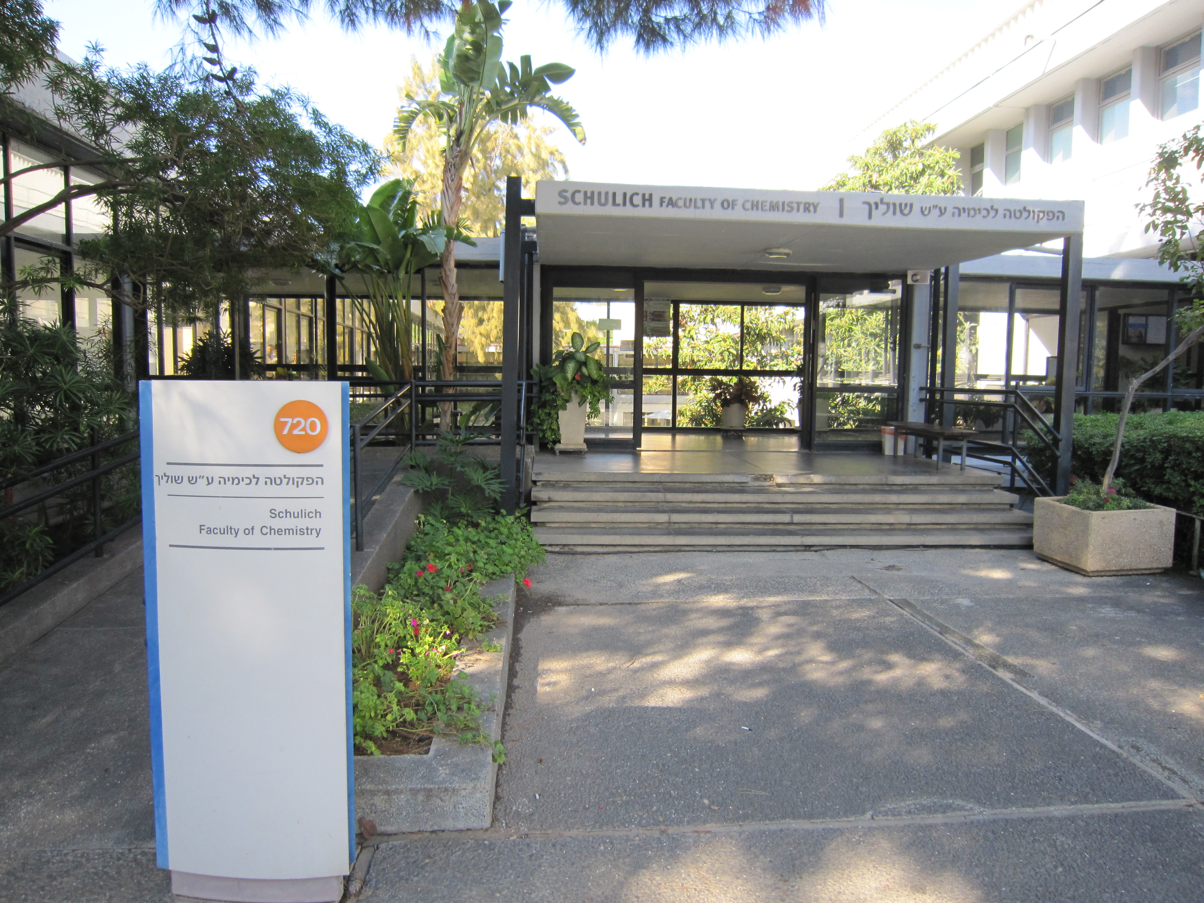 בנין הפקולטה לכימיה בטכניון